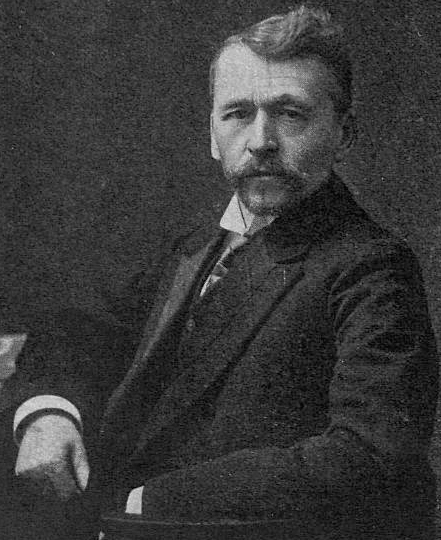 Тютрюмов Игорь Матвеевич